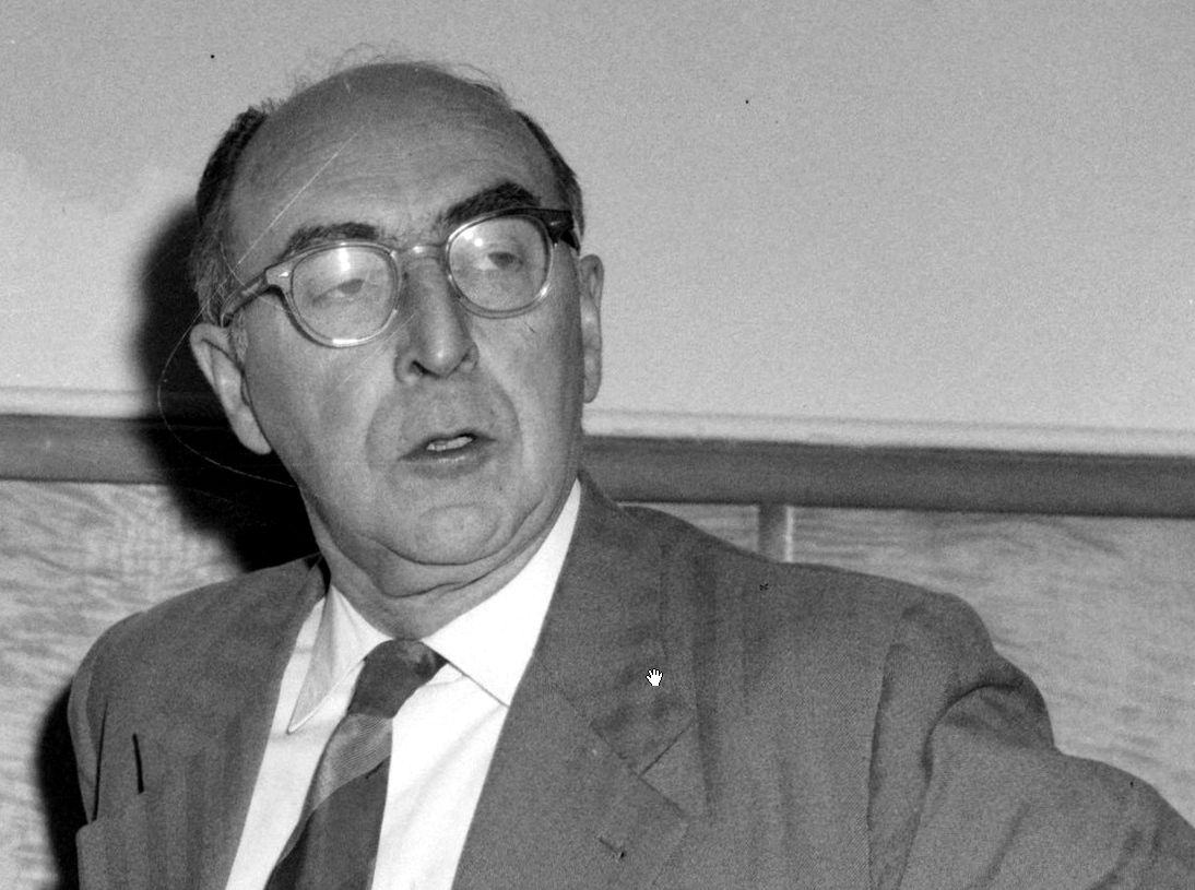 Buitengewoon congres van de Nederlandse Vakcentrale te Utrecht, prof. dr. J. F. Haccou tijdens zijn rede, 7 november 1959.